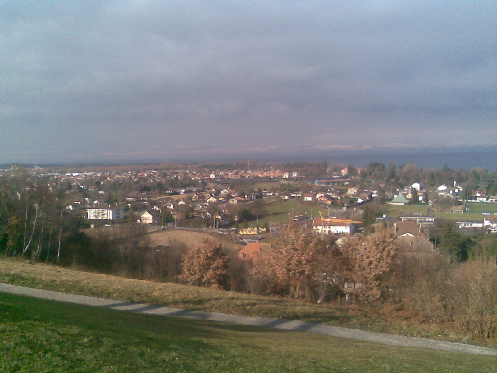 Vue d'ensemble de la plaine d'Amphion-les-bains, depuis le belvédère de Farquenoud.